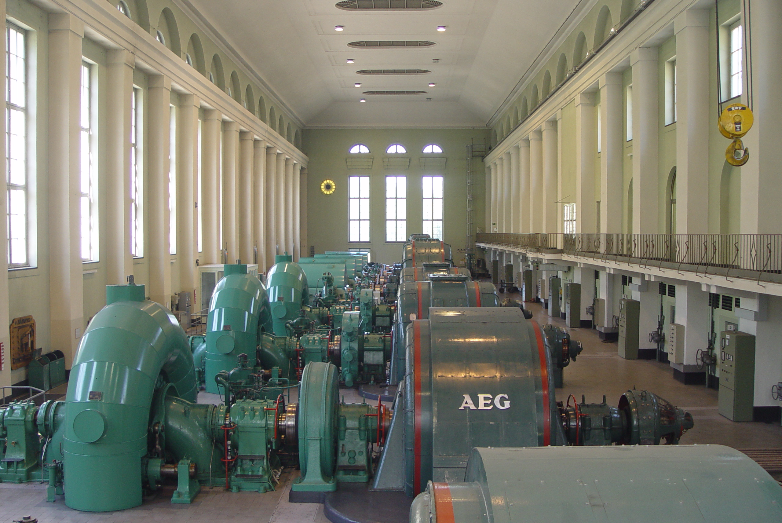 Walchenseekraftwerk Maschinengebäude